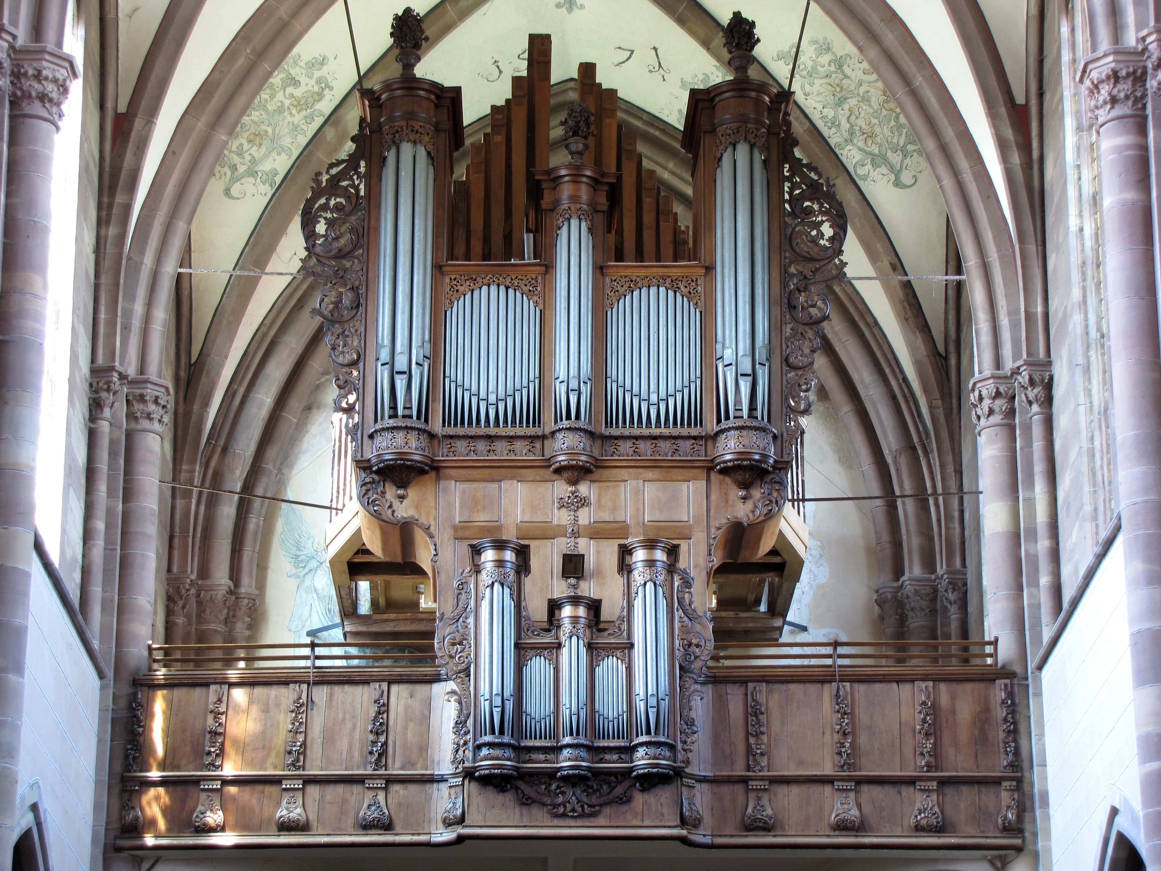 Alsace, Bas-Rhin, Abbatiale Saint-Étienne de Marmoutier (PA00084783, IA67007715). Orgue Andreas et Johann-Andreas Silbermann (1710-1746): This object is classé Monument Historique in the base Palissy, database of the French furniture patrimony of the French ministry of culture, under the references PM67001051 and IM67011808. This object is classé Monument Historique in the base Palissy, database of the French furniture patrimony of the French ministry of culture, under the references buffet + garde-corps PM67000163 buffet + garde-corps and instrument PM67000161 instrument.